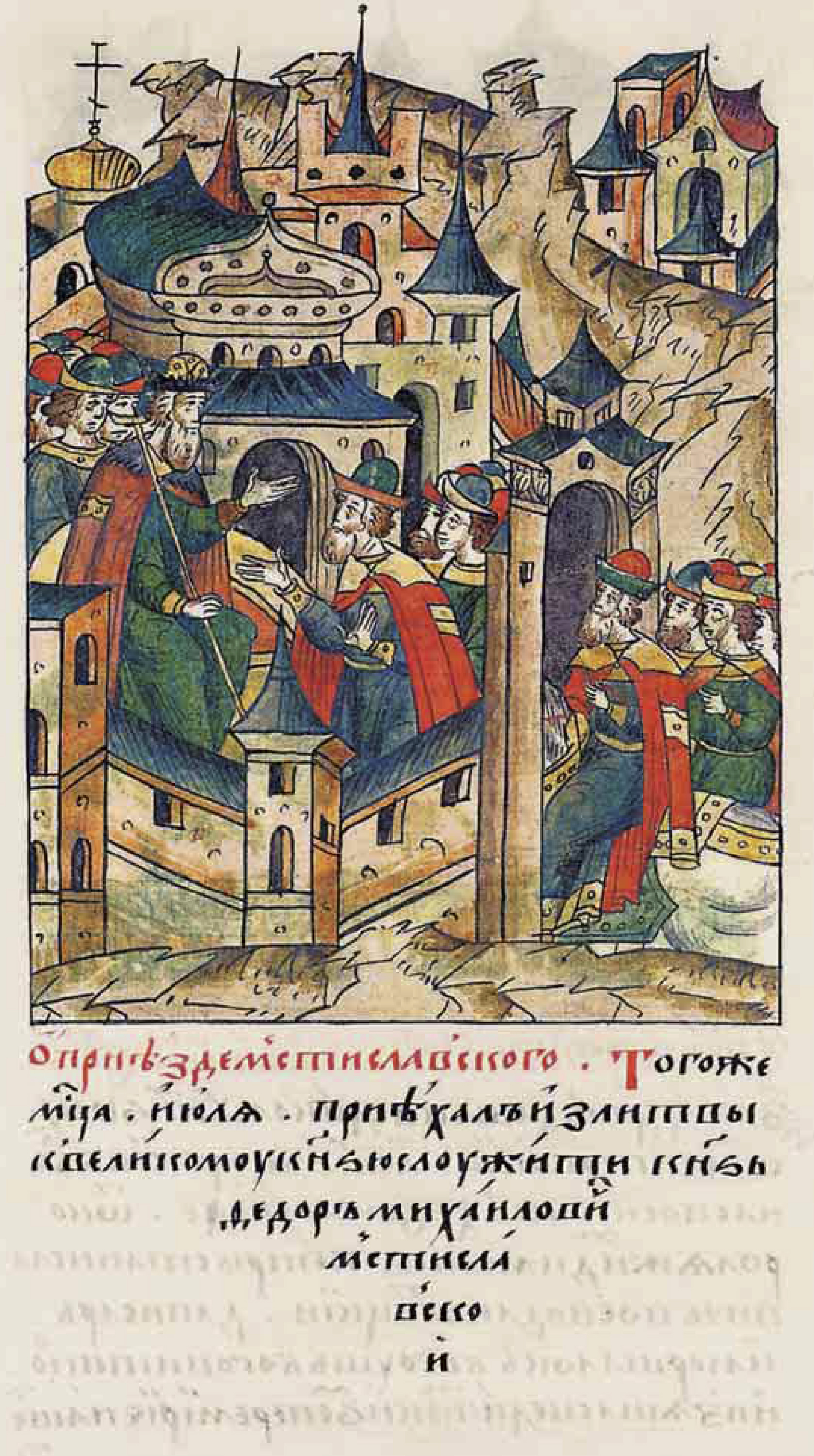 О приезде Мстис- лавского. В том же месяце июле приехал из Литвы к великому князю служить князь Федор Михайлович Мстиславский.